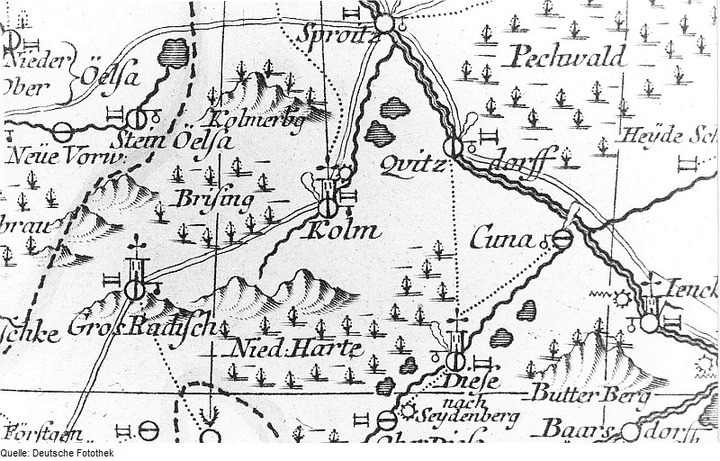 Original image description from the Deutsche Fotothek Quitzdorf am See-Kollm. Oberlausitzkarte, Schenk, 1759